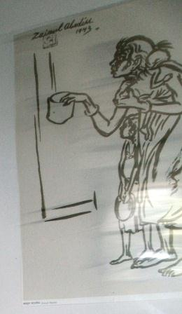 জয়নুল আবেদিন -এর চিত্রকর্ম